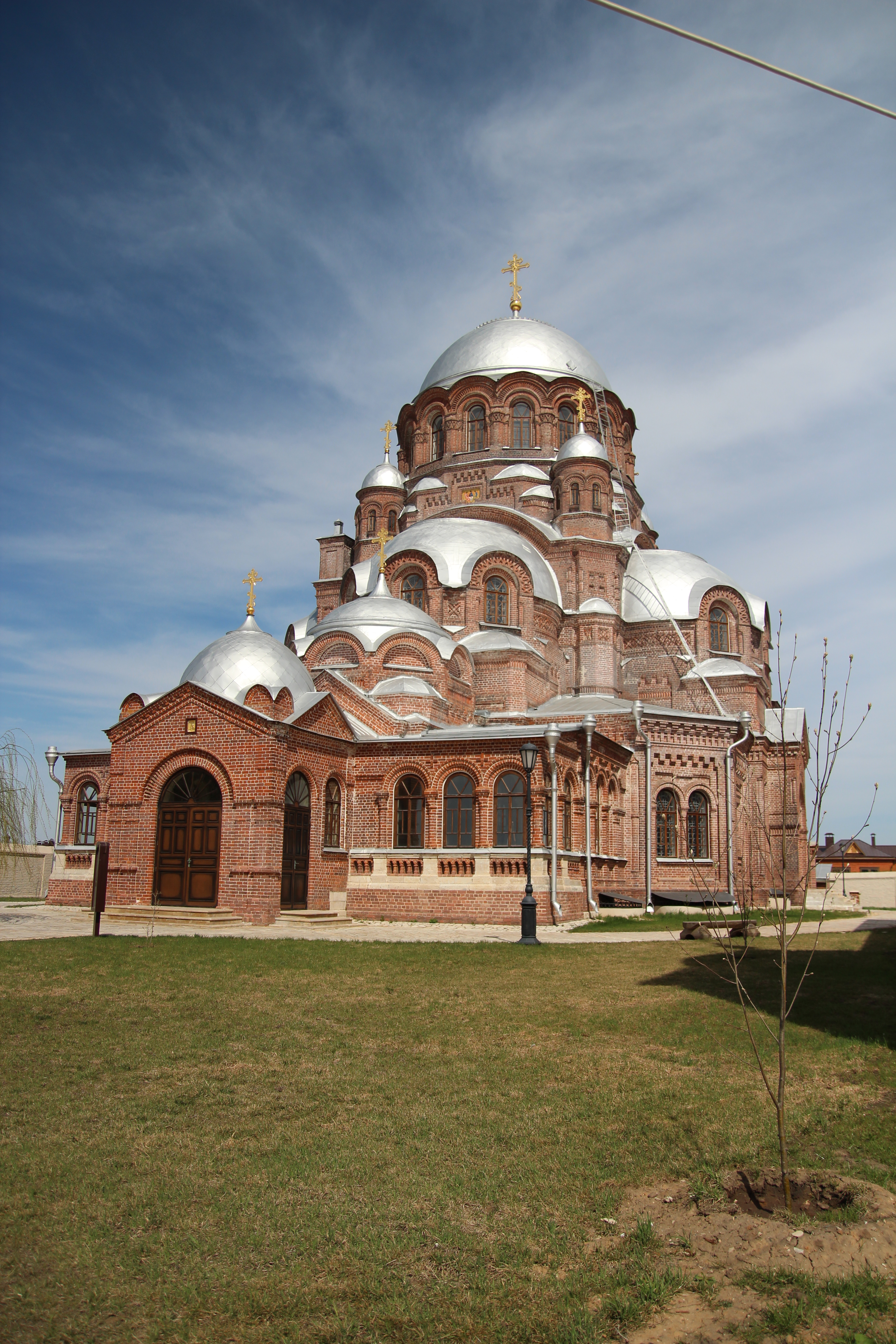 Собор Всех Скорбящих Радость: Свияжск, Зеленодольский район, Татарстан